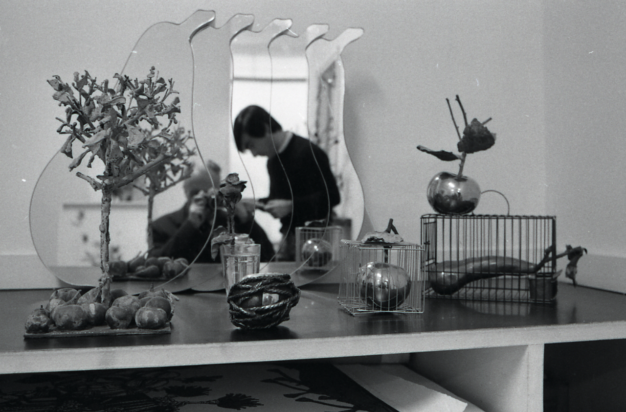 Servizio fotografico : Bologna, 1970 / Paolo Monti. - Strisce: 3, Fotogrammi complessivi: 16 : Negativo b/n, gelatina bromuro d'argento/ pellicola ; 35 mm. - ((I fotogrammi hanno una doppia numerazione. . - Sul portanegativi: Nikon HP4. - Sul dorso del portanegativi Monti specifica: "Cavaliere. Foscherari."